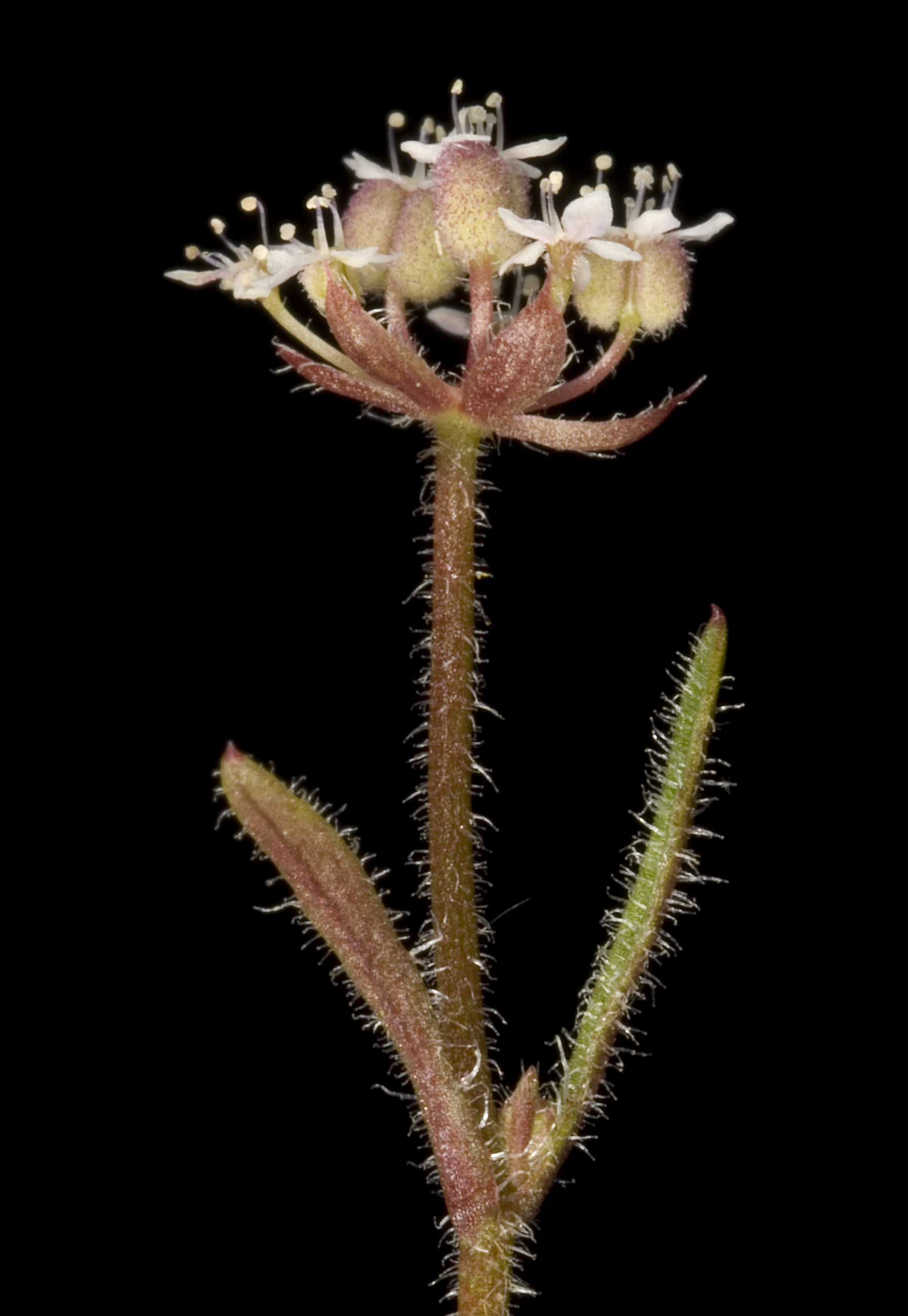 KRT3358